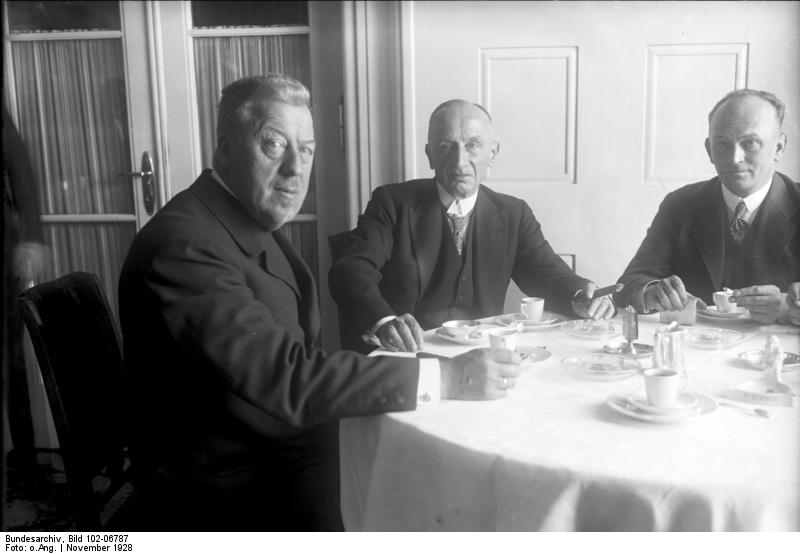 Die glückliche Landung des "Graf Zeppelin" nach seiner großen Amerikafahrt in Friedrichshafen a/Bodensee! Aufnahmen von unserm nach dort entsandten Sonder-Bild-Berichterstatter! Das erste Diner nach der glücklichen Landung in Friedrichshafen a/Bodensee: v.li.n.re.: Der Führer des "Graf Zeppelin" Dr. Hugo Eckener, Reichsverkehrsminister Guerarw [Guèrard], Ministerialdirektor Brandenburg.